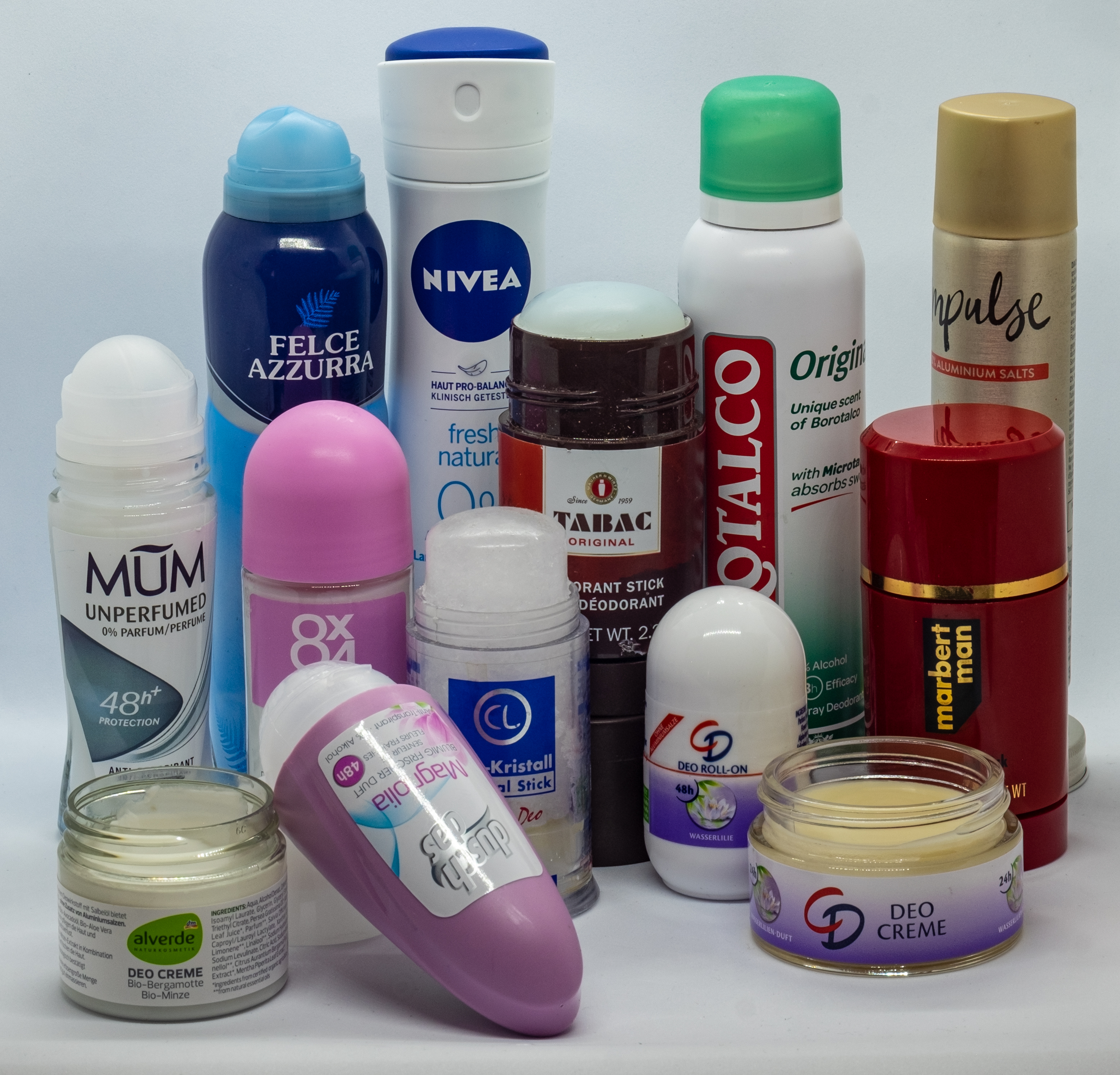 Deodorants gekauft bei Bipa, Billa, Spar, Hofer, DM, Rossmann, Edeka